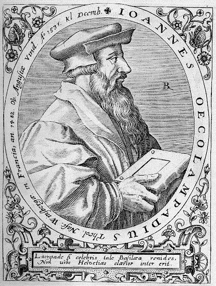 Johannes Oekolampad / Johannes Oecolampadius